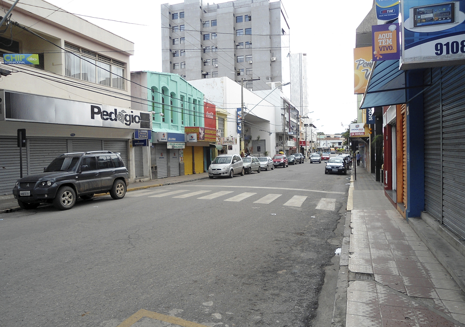 Imagem da Rua Benedito Valadares, à frente do Banco do Brasil, localizada na cidade de Pará de Minas.